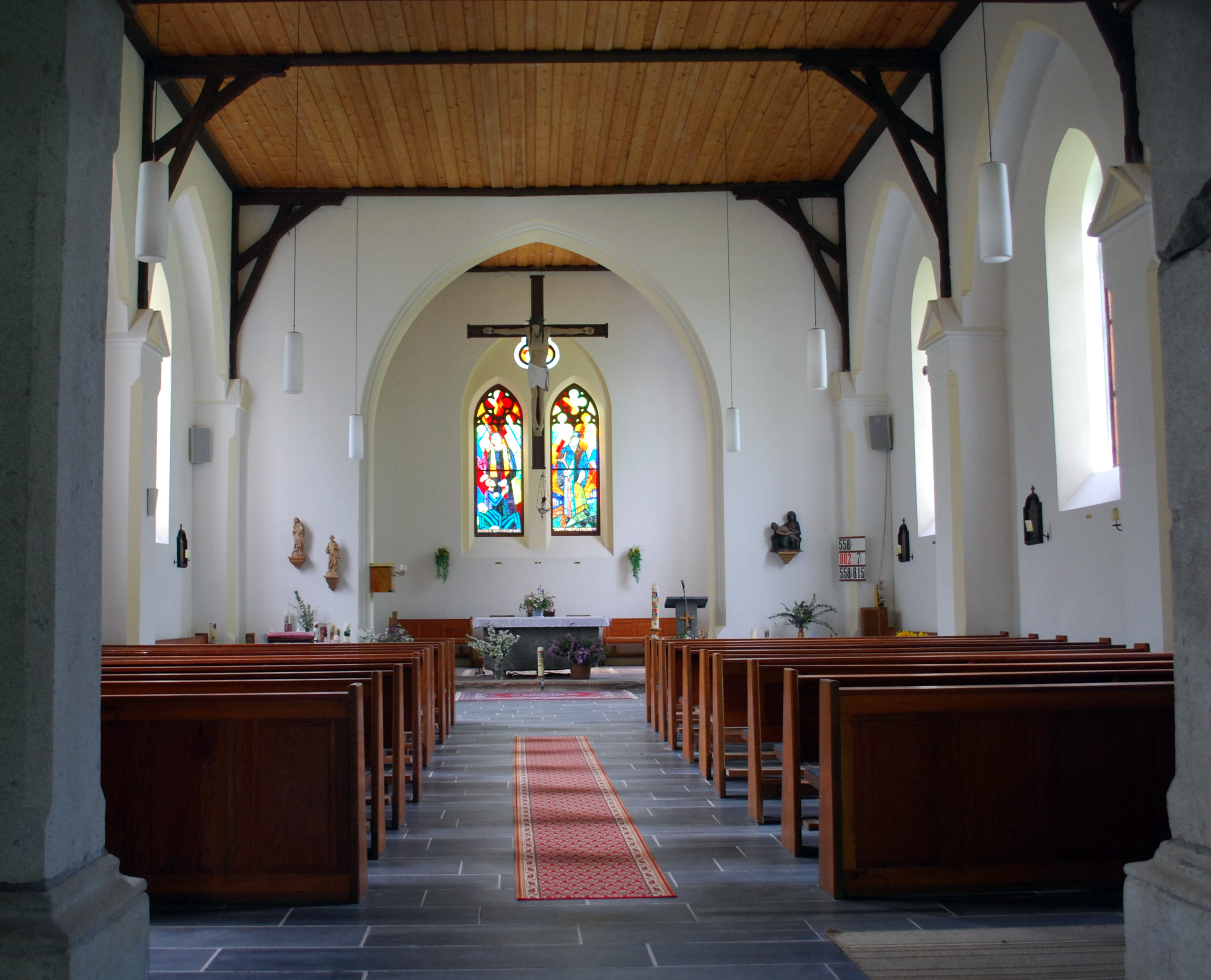 Zvonkova Kirche innen